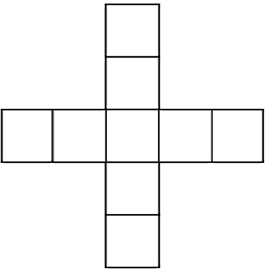 中國傳統棋類之一